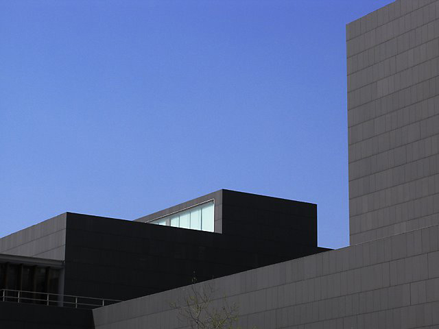 Photo: Baltasar García S